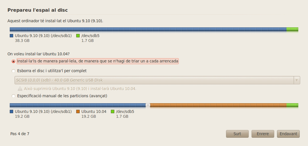 Ubuntu_Instal_4b_HD.jpg